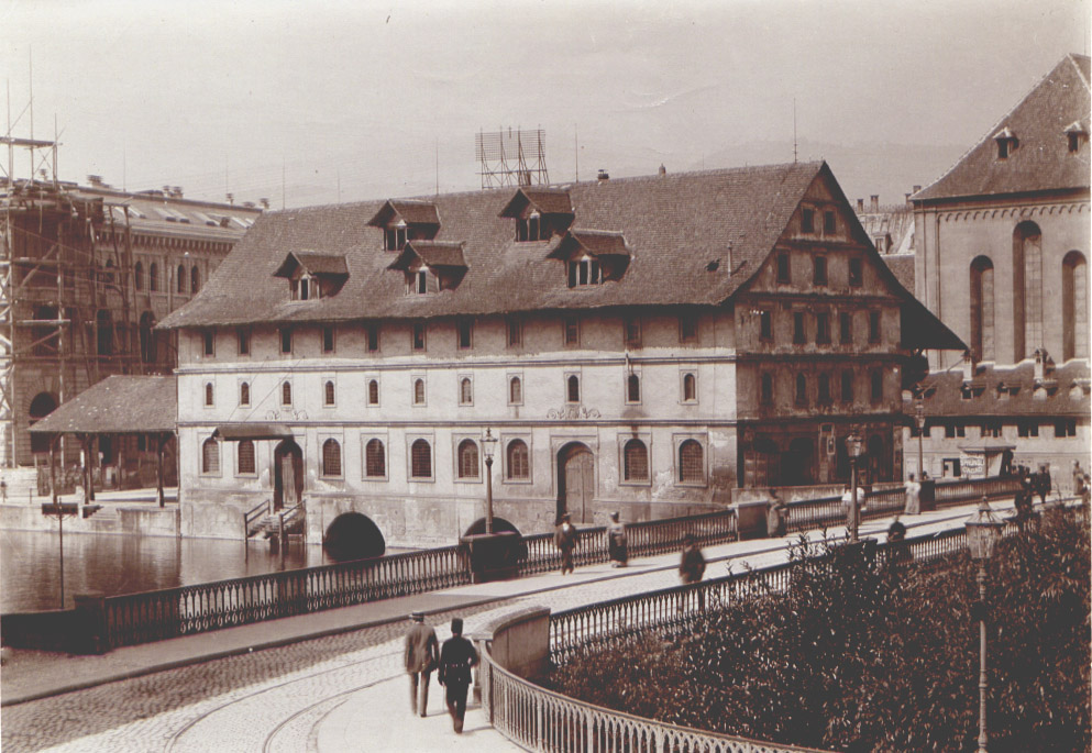 Kaufhaus um 1897. Links im Bau die neue Fraumünsterpost.